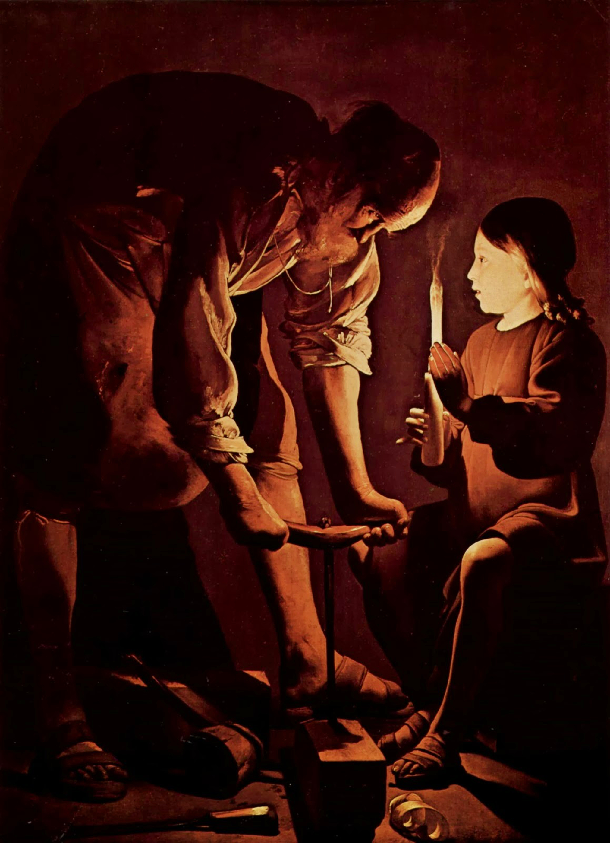 Saint Joseph, patron des charpentiers, travaille une poutre devant l'Enfant Jésus qui semble déjà y voir le bois de sa croix.